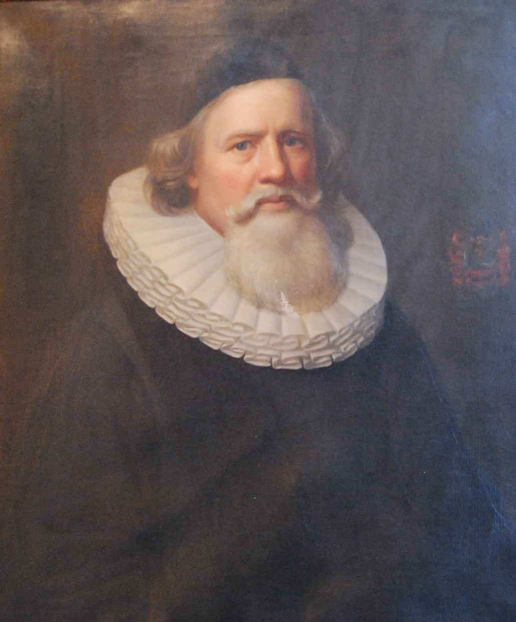 Portrætmaleri af Biskop Henrik Gerner